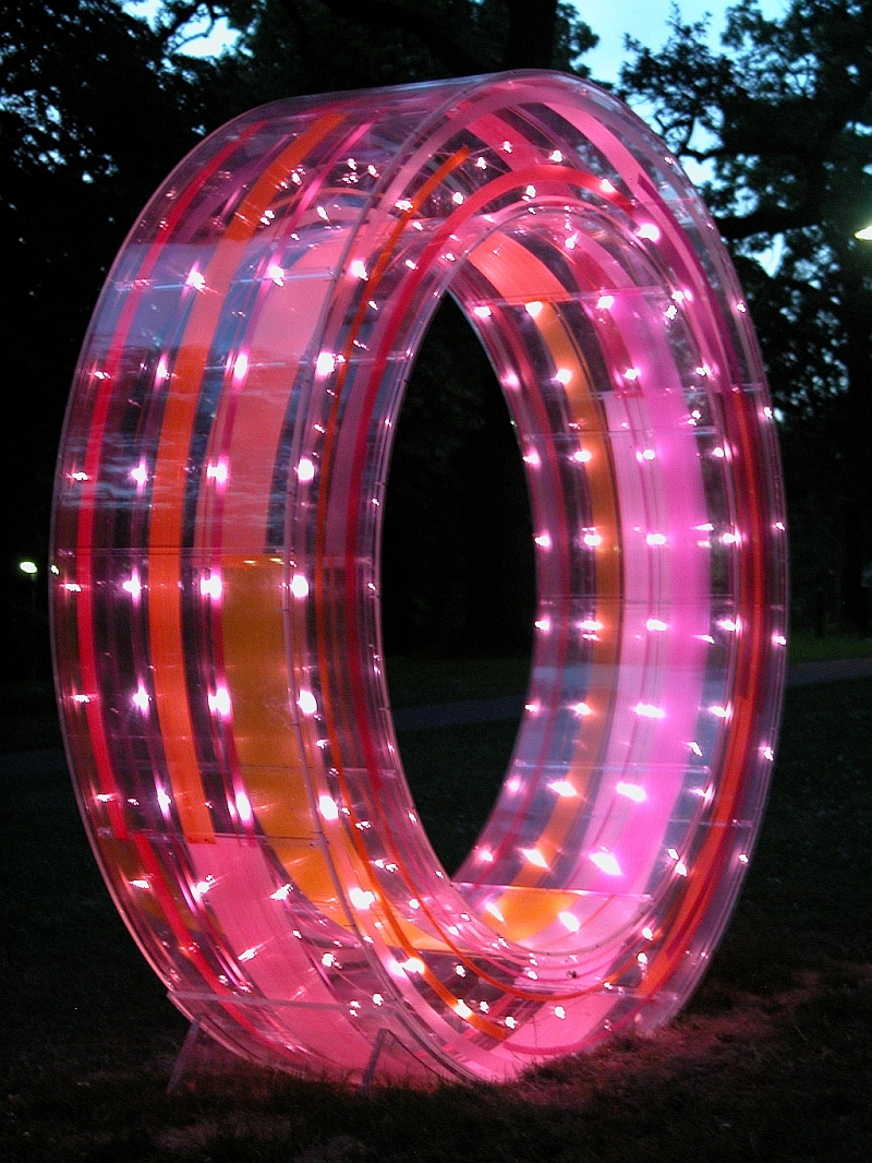 Braunschweiger Lichtparcours 2010: „farbring 450d“ von Susanne Rottenbacher